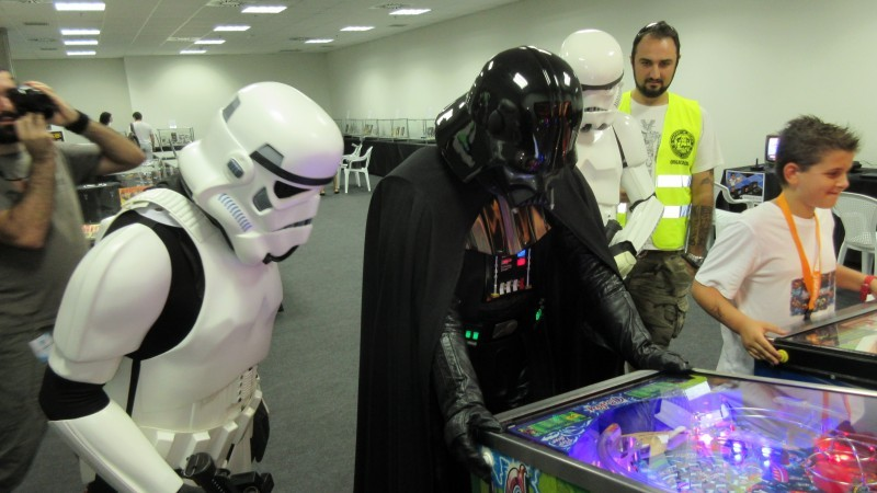 Darth Vader jugando pimball en RetroEuskal. Como parte del homenaje a los juegos de Star Wars en RetroEuskal 2015 se tuvo la visita de Darth Vader escoltado por dos Stormtroopers